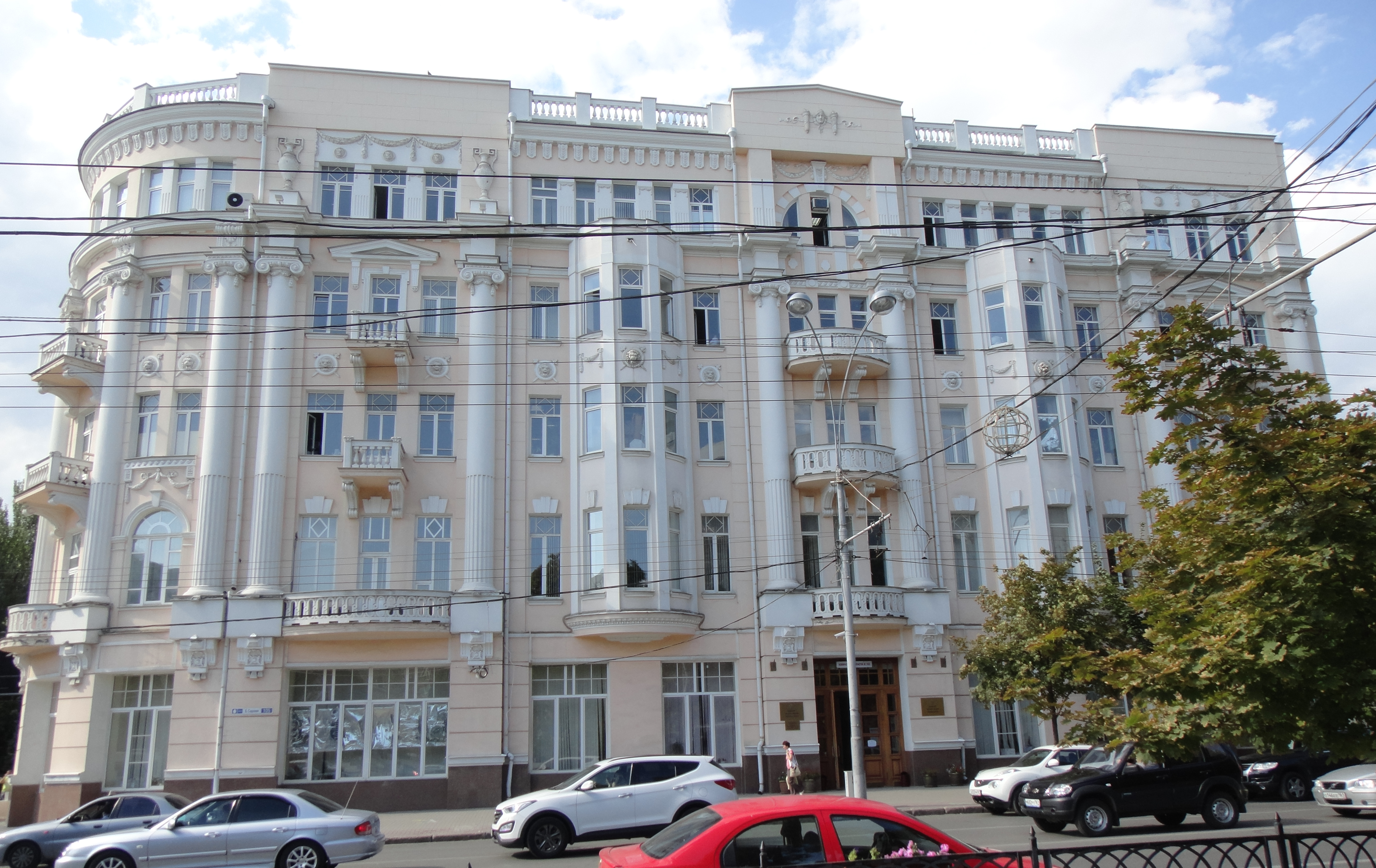 Дом купца Кистова (Ростовская область, Ростов-на-Дону, Большая Садовая улица, 105)